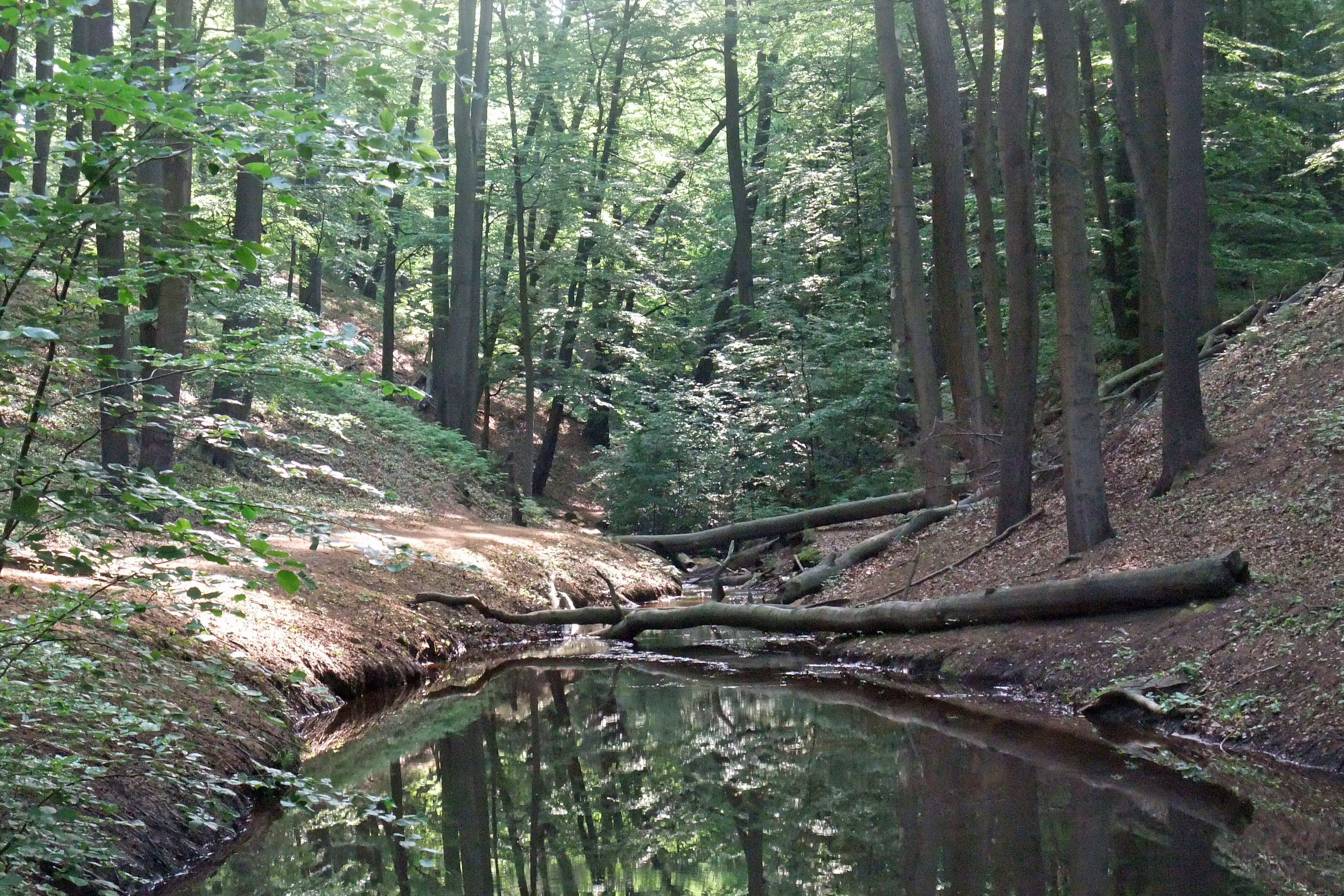 Flächennaturdenkmal Buchenaltholz am Eisebornbach in der Dresdner Heide